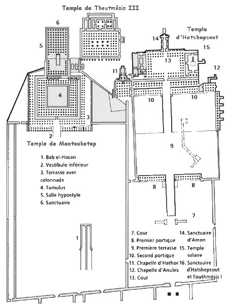 Deir el-Bahari: mapa de los tres templos